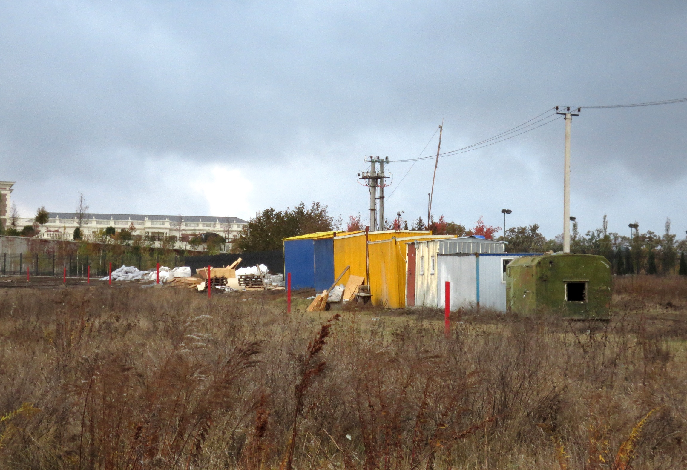 Хотівське городище, на схід від центру. Червоні стовпчики позначають нову межу пам'ятки, з якої виключено весь східний край городища (праворуч), так само, як південний і вже знищений північний. Погляд на північ.